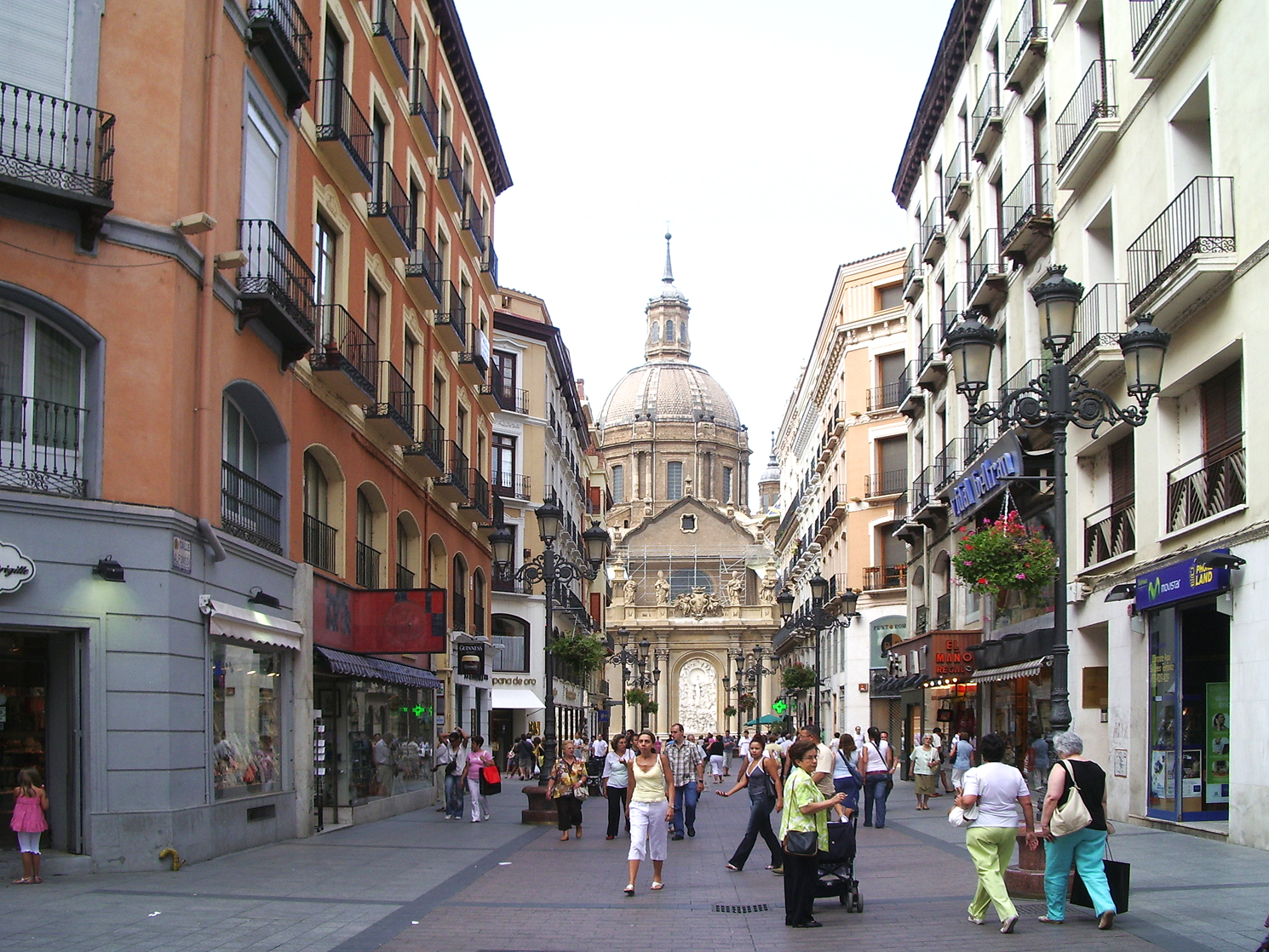 Calle Alfonso I (Zaragoza, España) con la cúpula central de la Basílica del Pilar al fondo.